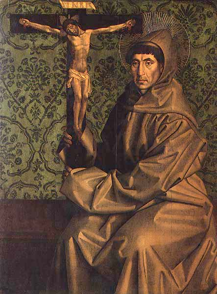 São Francisco. Pintura de Nuno Gonçalves